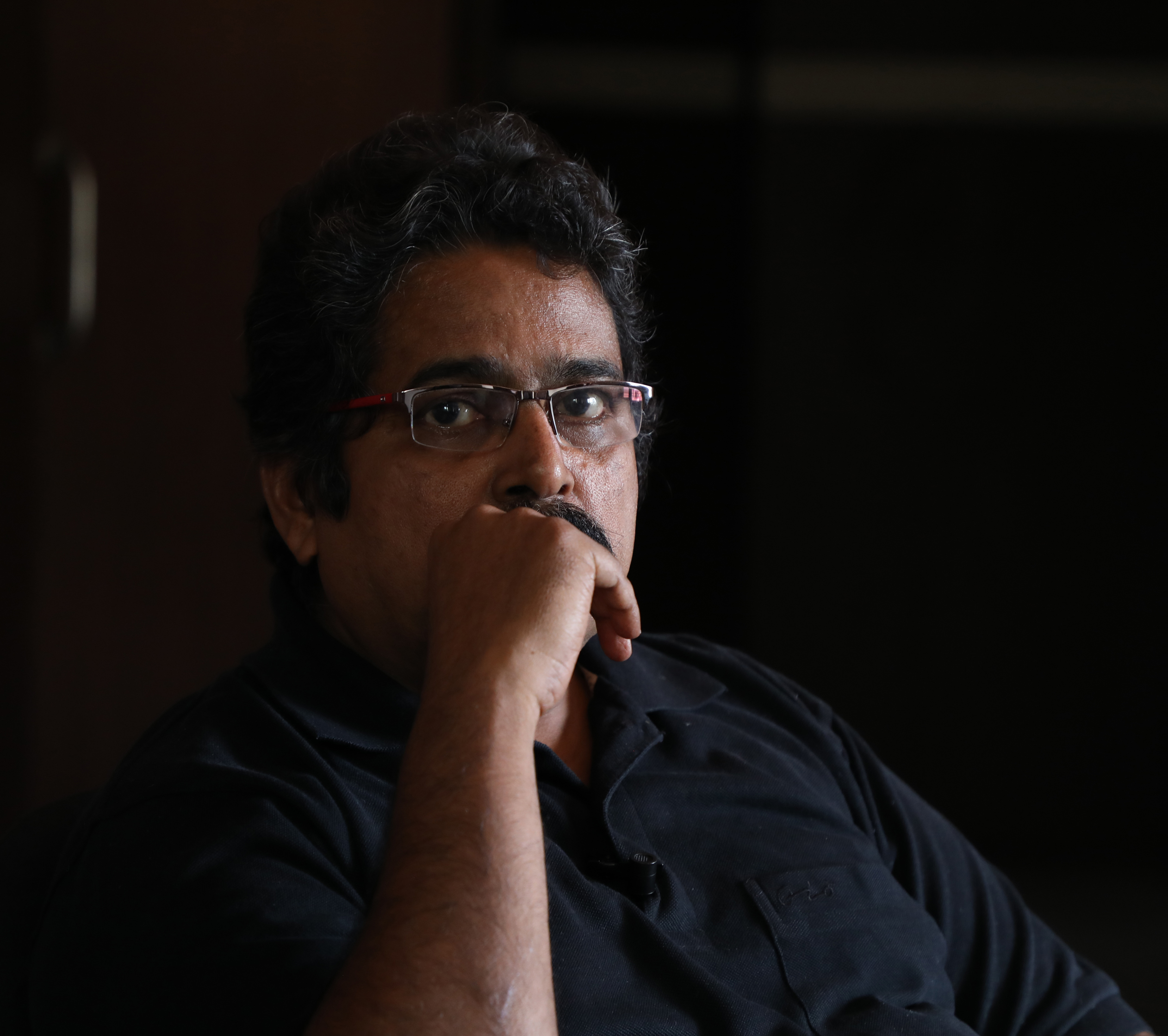 ಕನ್ನಡ: Jogi1